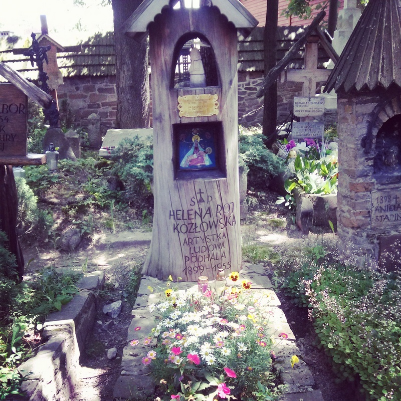 Zakopane, cmentarz "Na Pęksowym Brzyzku"